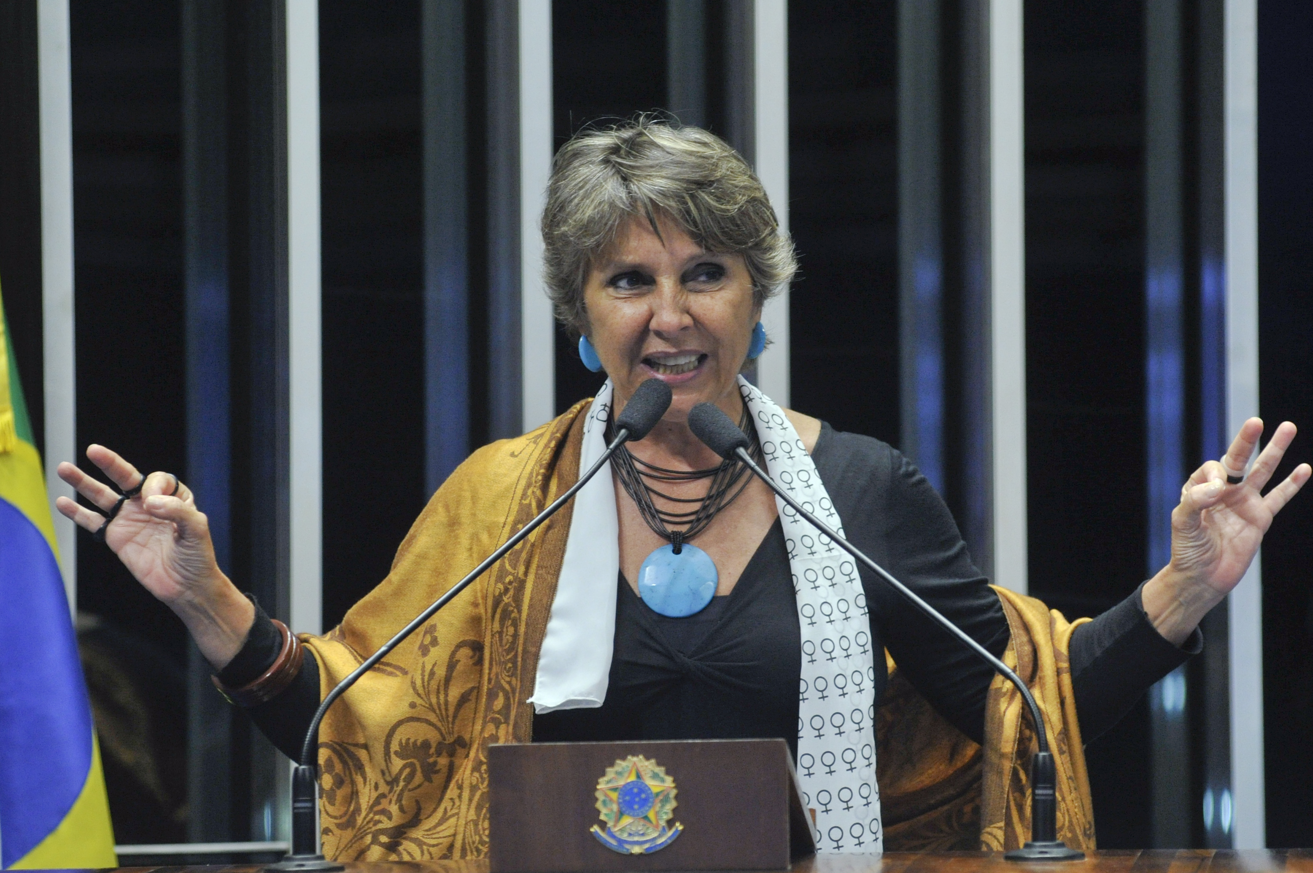 Plenário do Congresso Nacional durante sessão solene para homenagear a 5ª Marcha das Margaridas. Em discurso, deputada Federal Erika Kokay (PT-DF) Foto: Geraldo Magela/Agência Senado